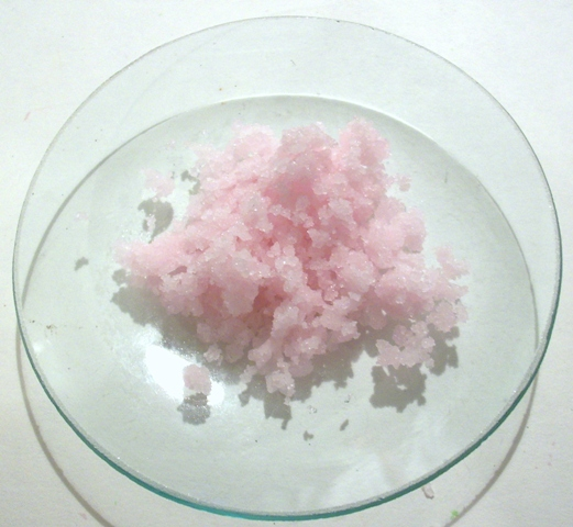 MnCl2